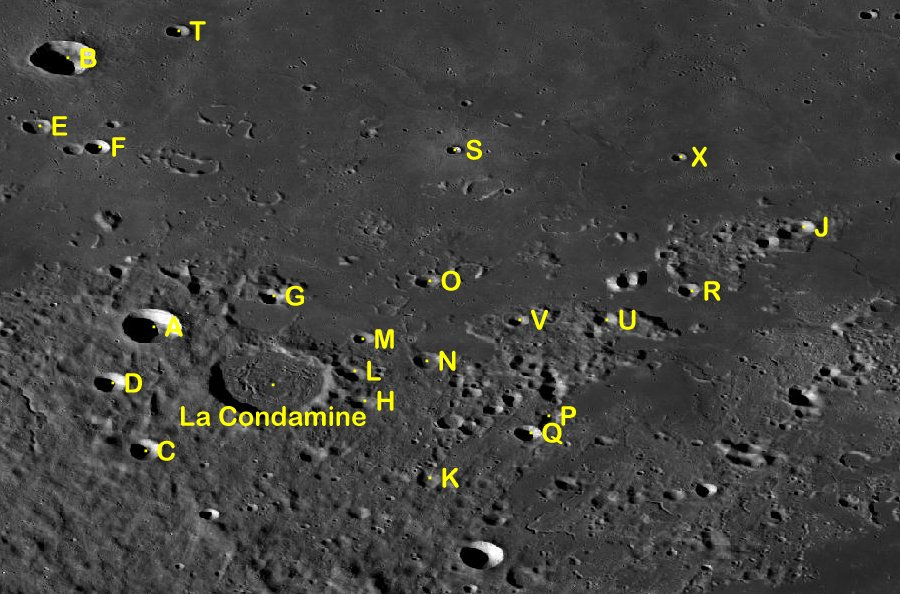 Cráter lunar La Condamine. Cráteres satélite. (Imagen LRO)